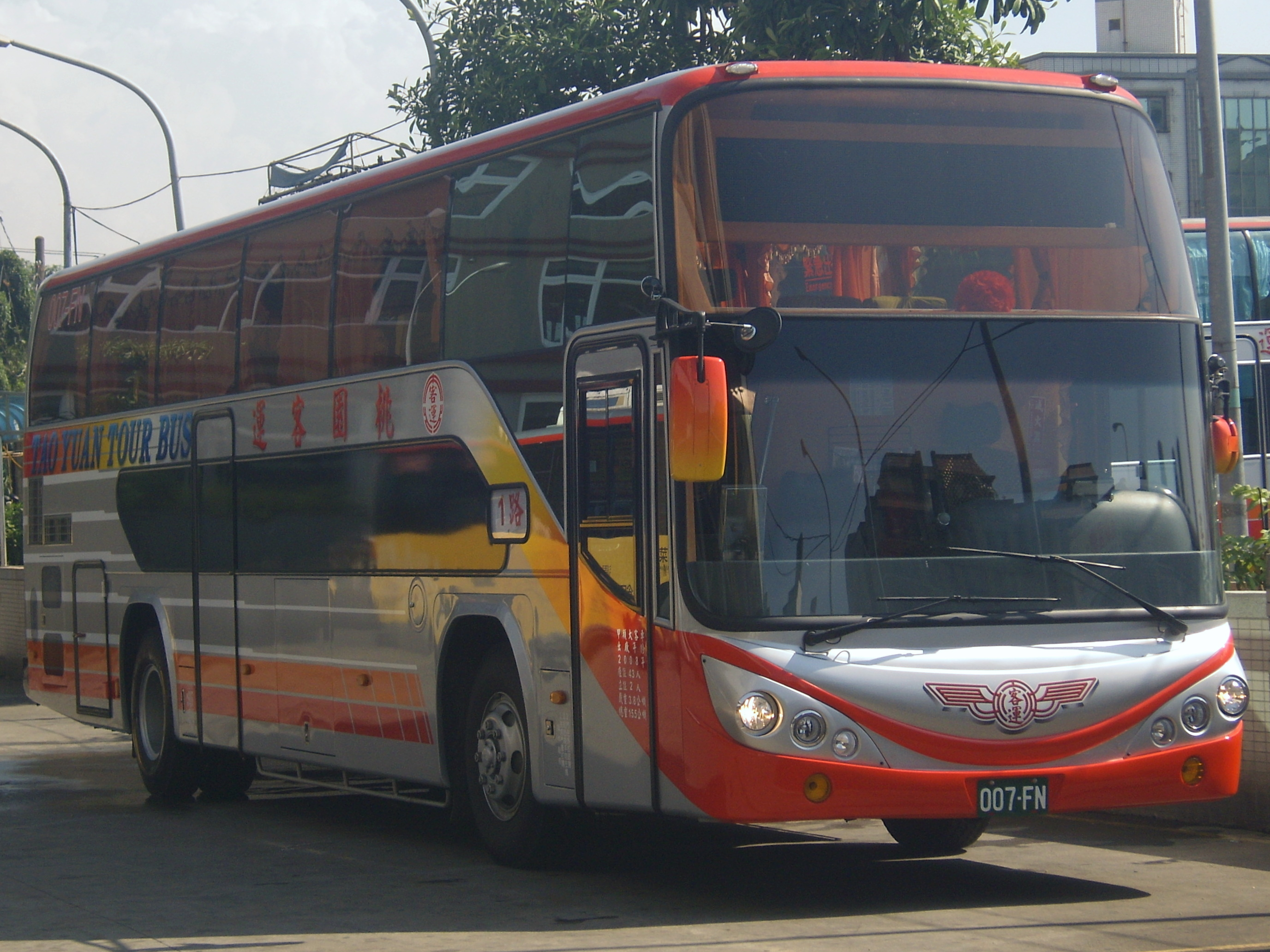 Taoyuan Bus - Fuso RM11FNL2 007-FN.